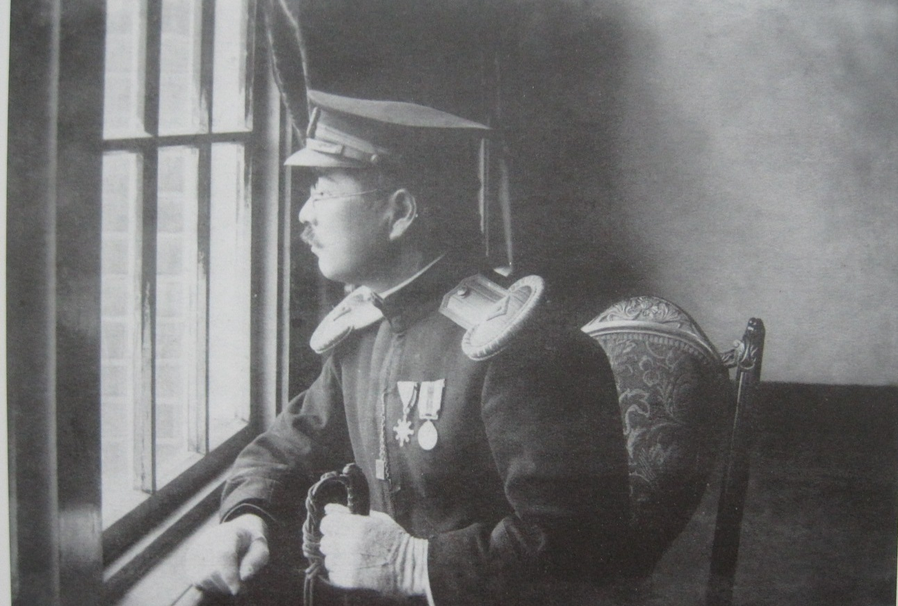 田川辰一，臺中一中首任校長